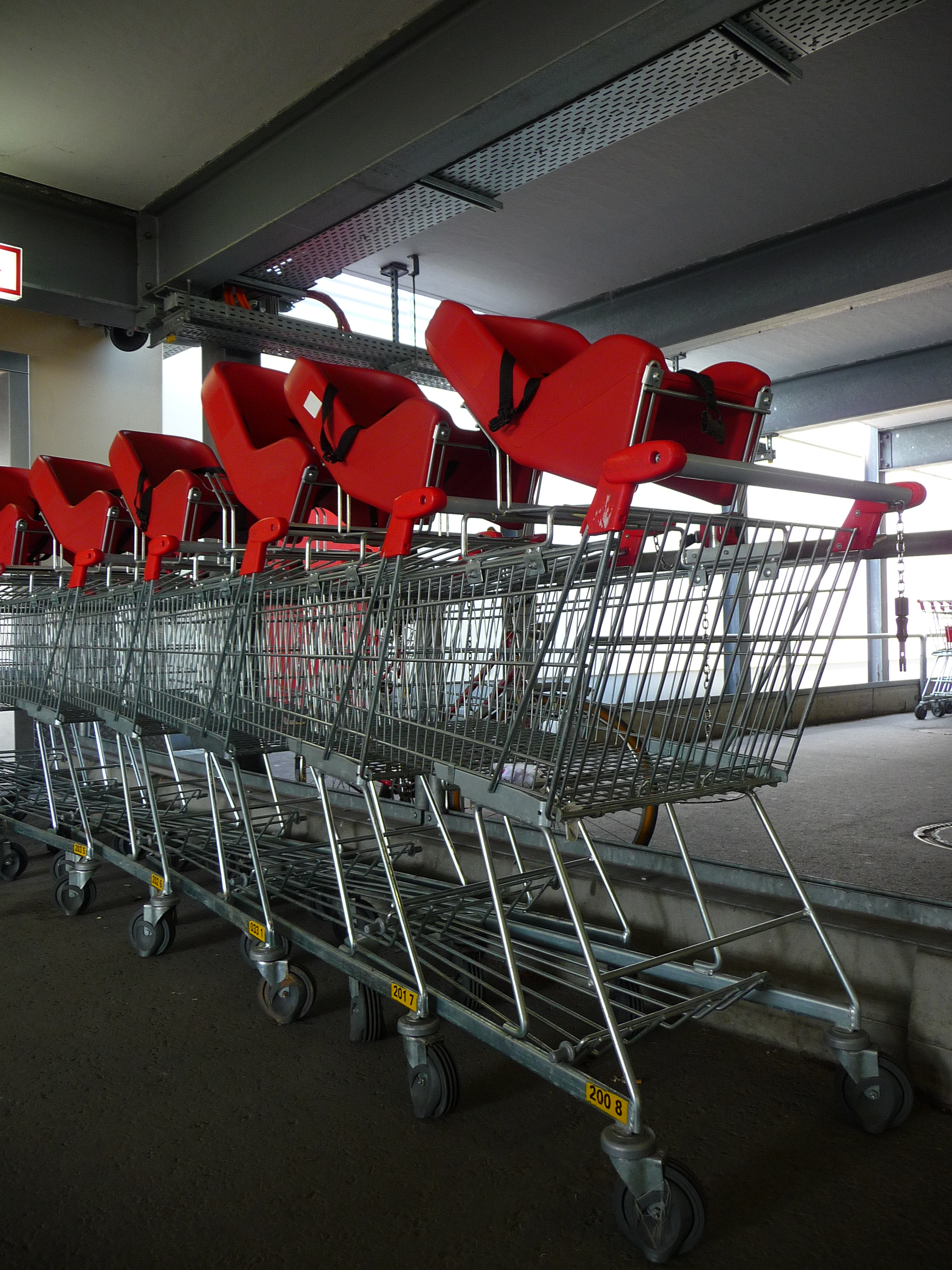 Einkaufswagen mit montierter Babyschale, fotografiert in Baden-Württemberg (Deutschland)